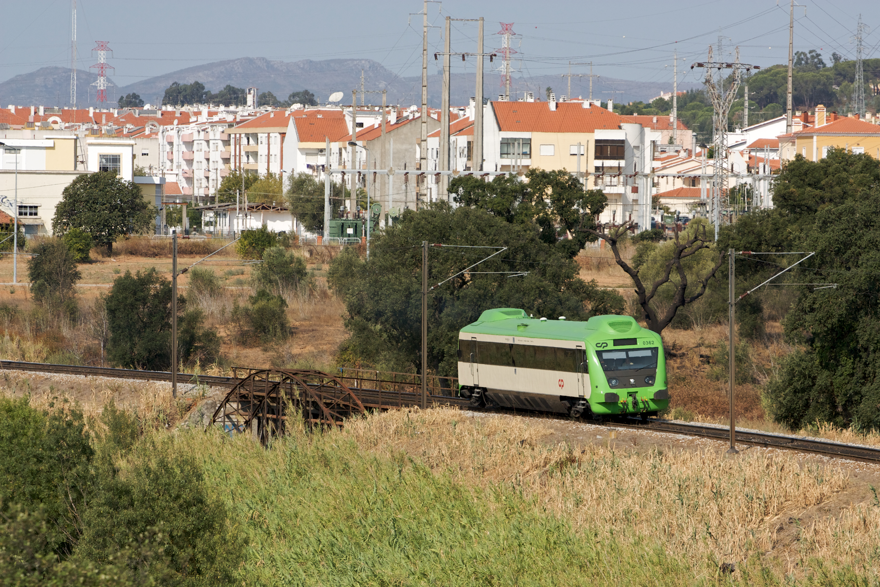 Tipo: Marcha de serviço 95285 [Entroncamento - Castelo Branco] Local: Entroncamento [Linha da Beira Baixa, PK 107] Data e hora: 15 de Setembro de 2009 [10h39] Material: Automotora 0362 [Unidade Simples Diesel - Allan Renovada]